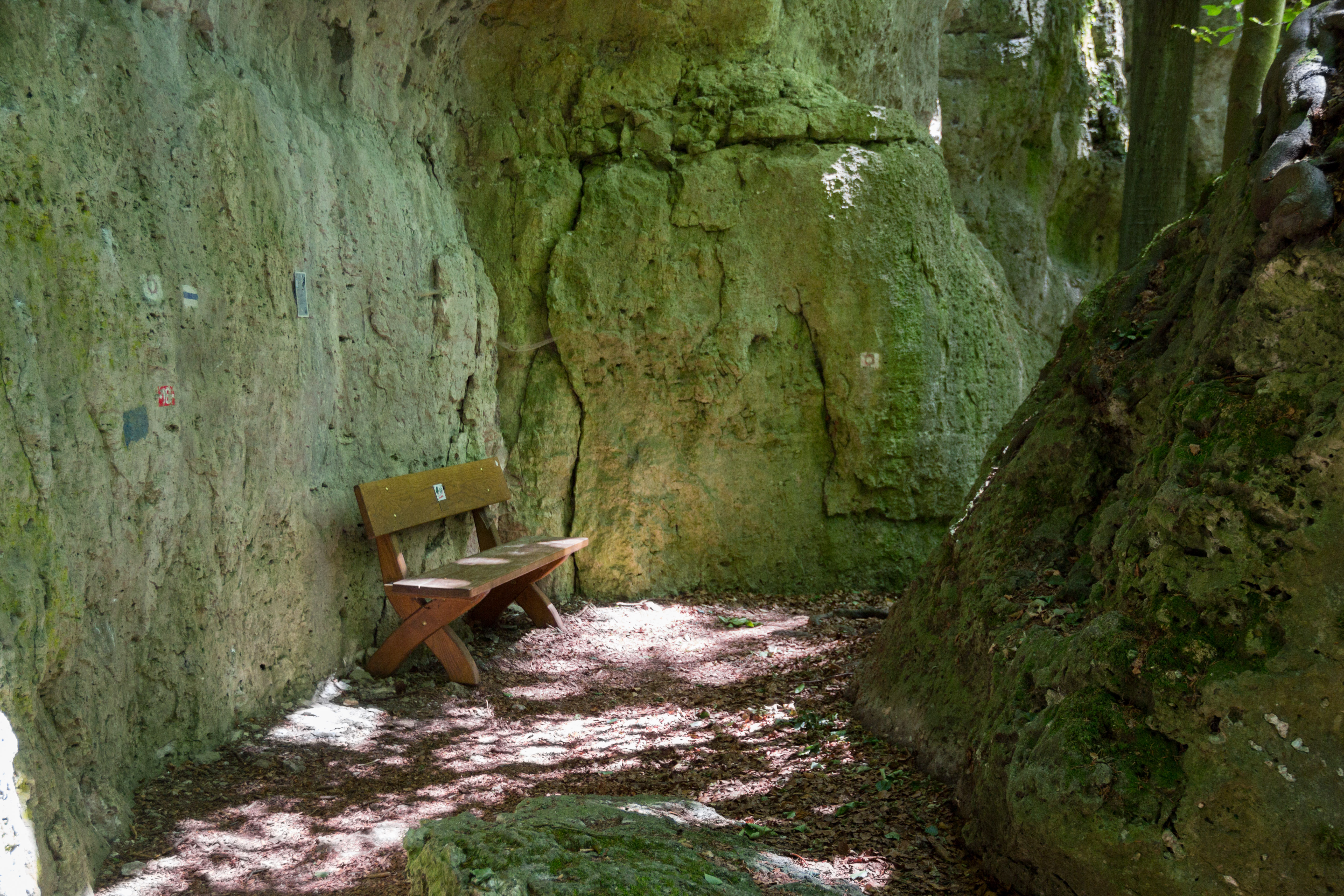 Dolomitfelsen, Steinberg, Königstein